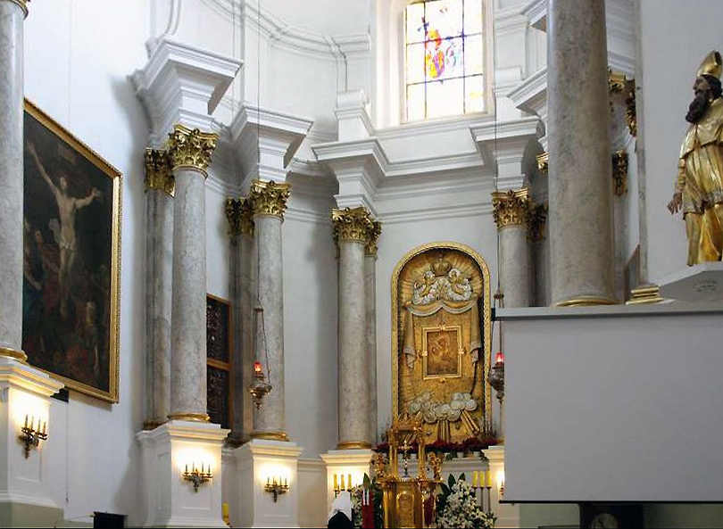 Chełm - Sanktuarium Maryjne na Górze Chełmskiej